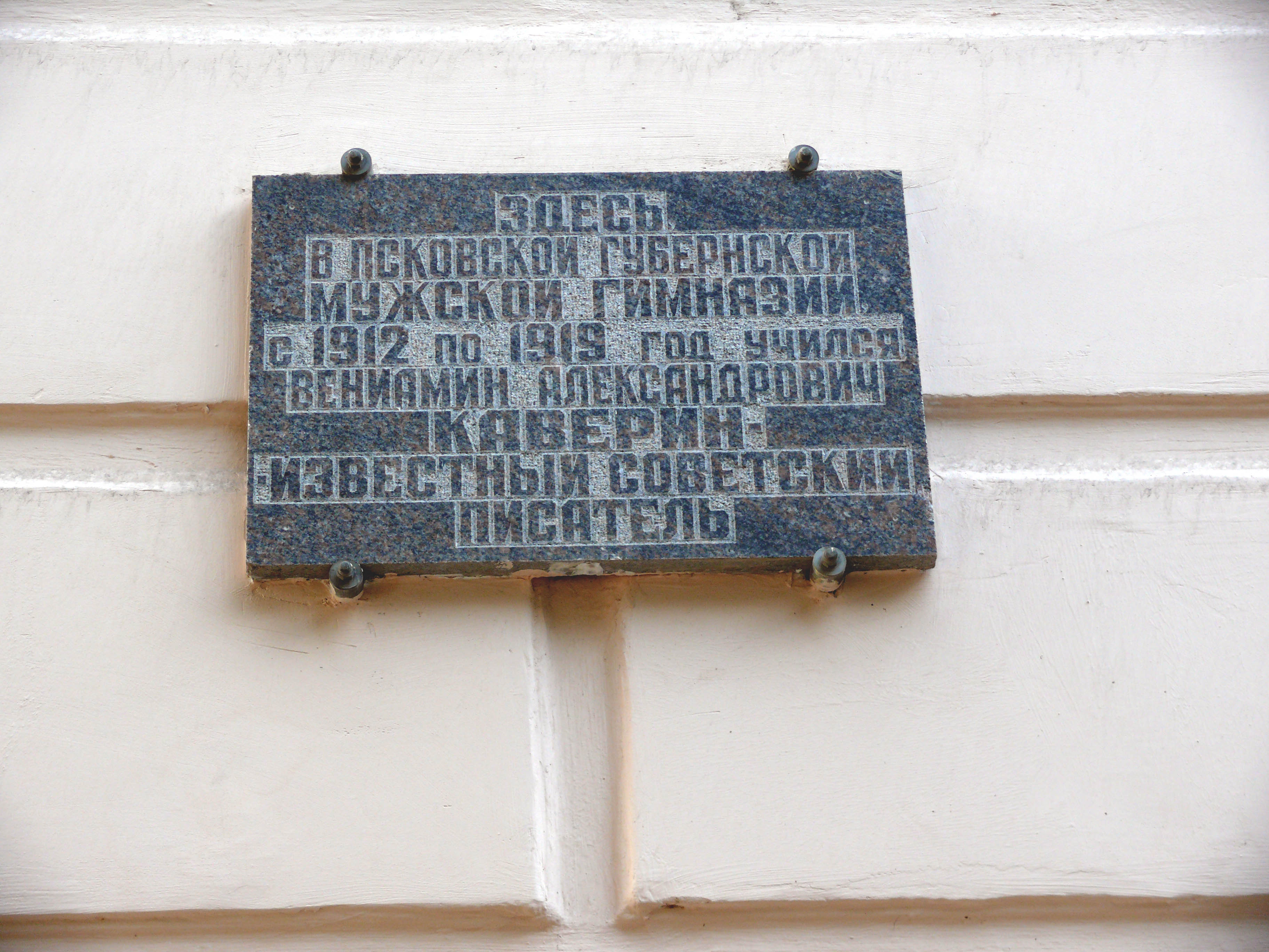 Псков. Памятная доска на Мужской гимназии